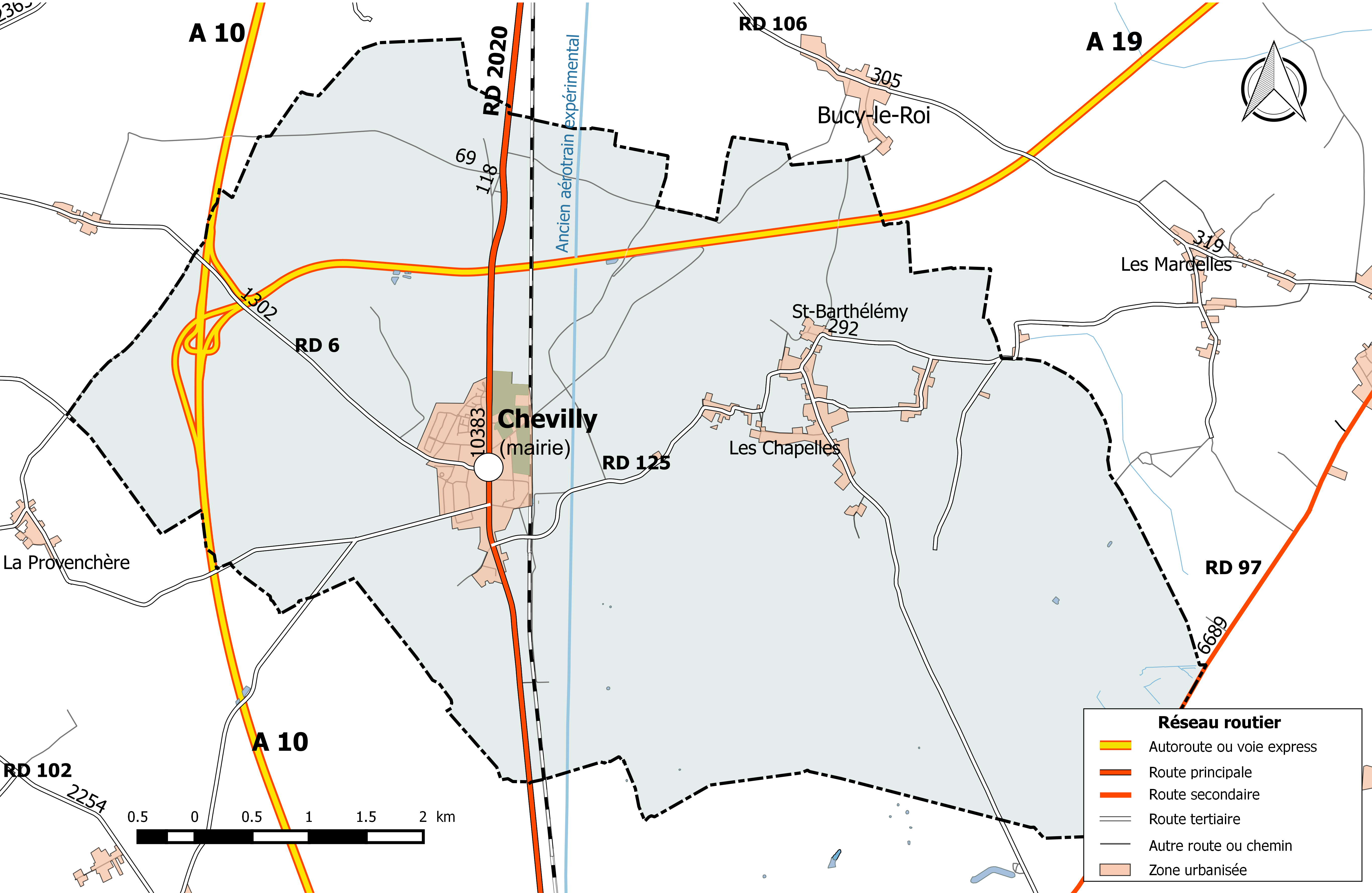 Carte du réseau routier de la commune de Chevilly (Loiret).